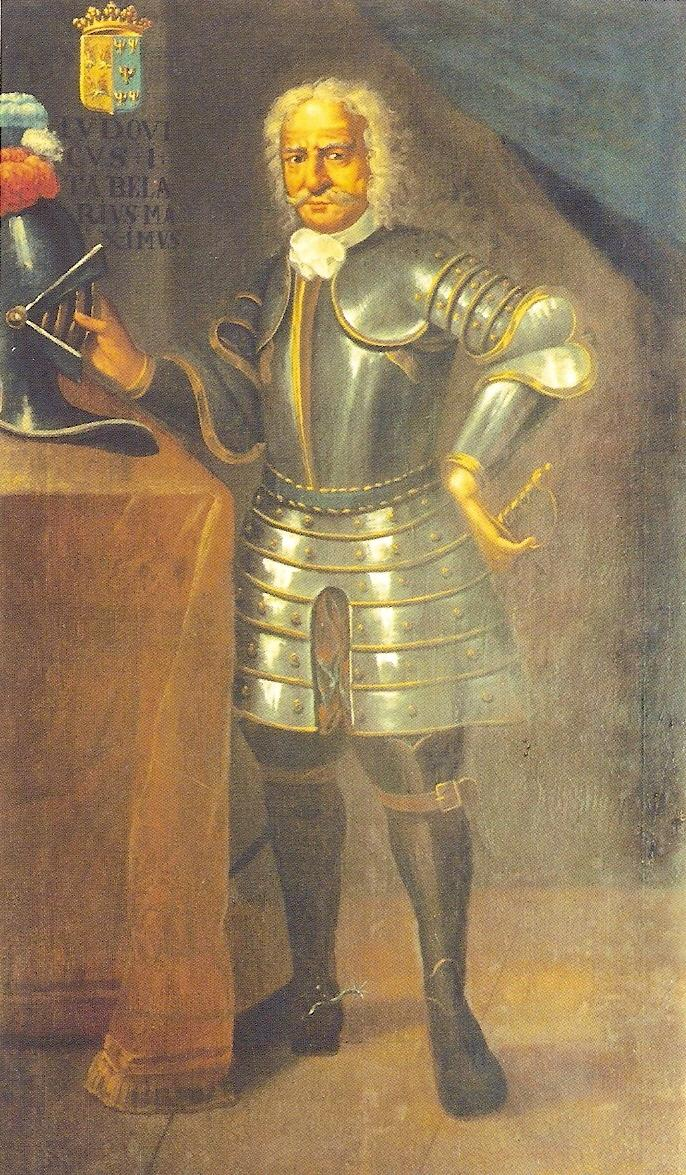 Retrato de Luís Gomes de Elvas, pintado no Séc. XVII.